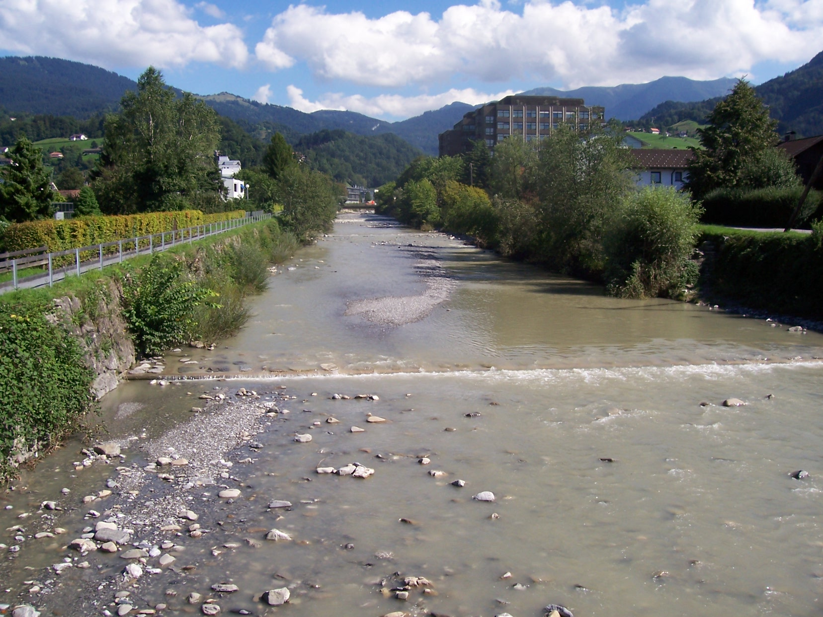 The Dornbirner Ache River in the city of Dornbirn. / Die Dornbirner Ache im Stadtgebiet Dornbirns.